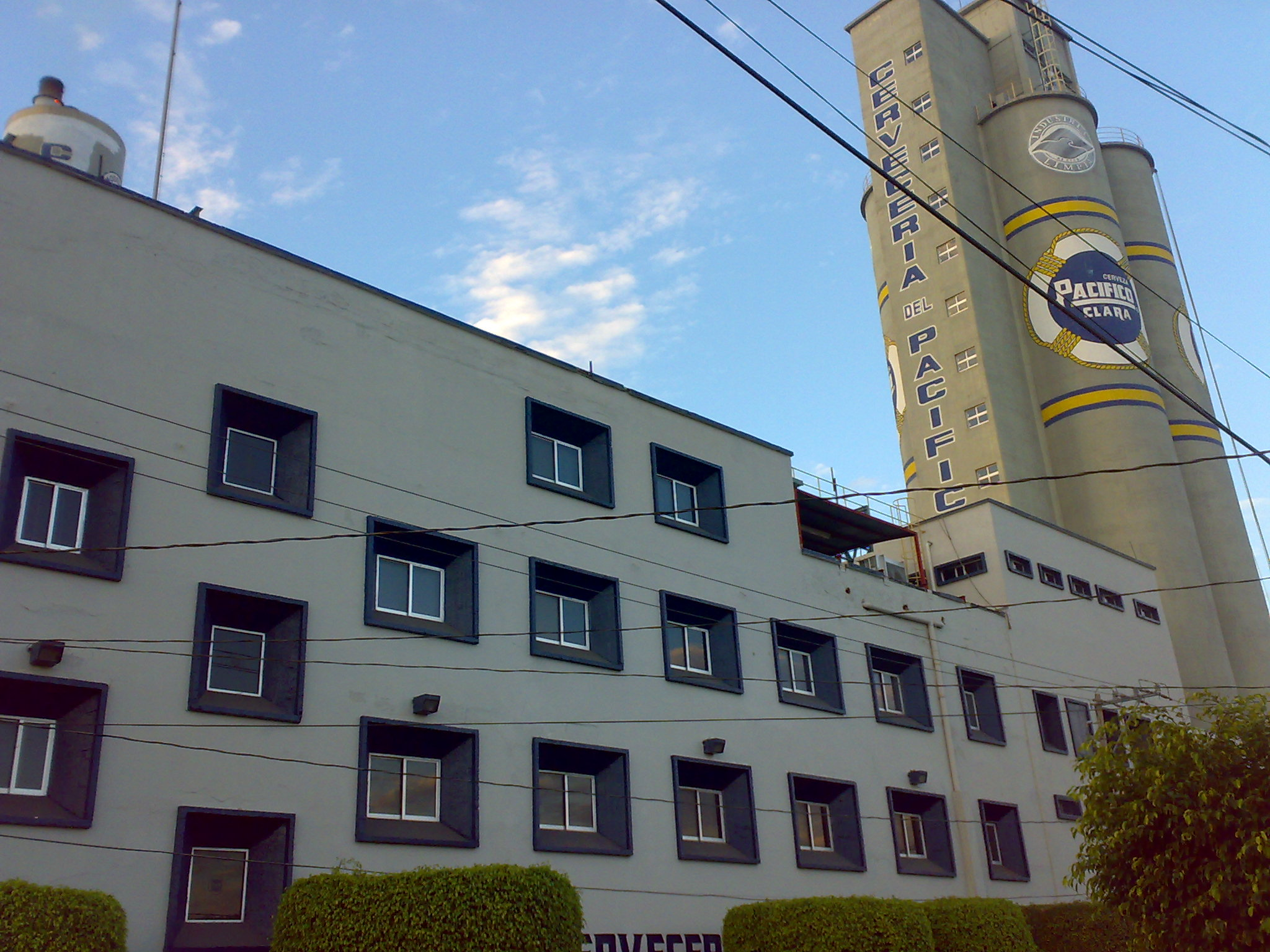 Cervecería Pacifíco, Mazatlán.